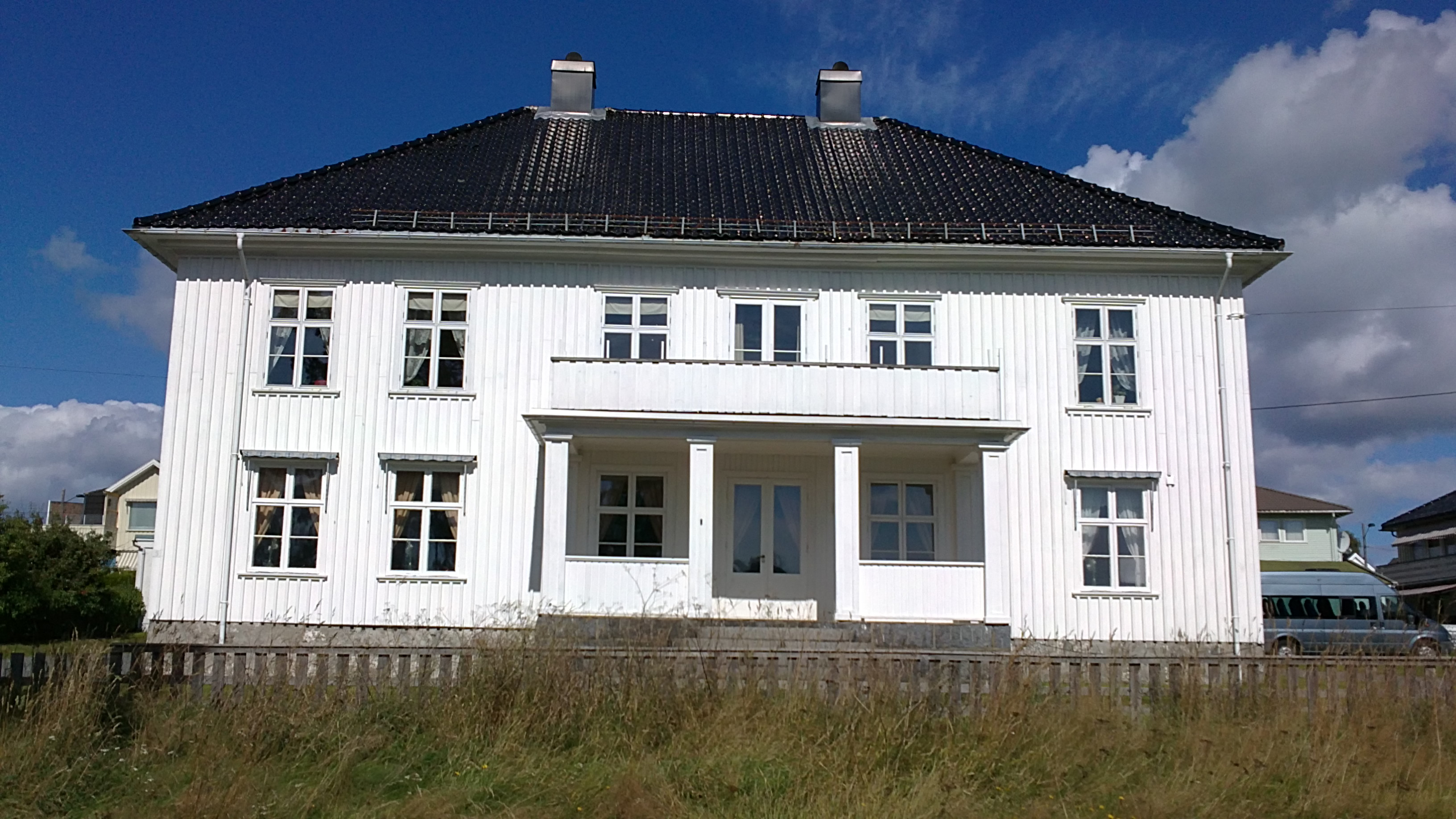 Fotografi av gården Øvre Nanset